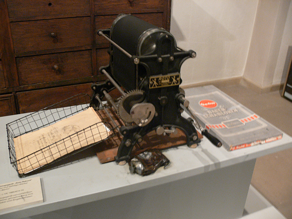 Matrizenabzugsgerät (Mimeograph, Umdrucker) „Roto-Rekord“, beschriftet „Roto- und Debego Werke/Königslutter–Berlin“, um 1900, benutzt zur Vervielfältigung von Werbeprospekten und Angebotslisten eines Textilgeschäfts Landesmuseum Württemberg (Außenstelle: Museum für Volkskultur Waldenbuch) E.6.1, Inv. Nr. L-VK 1985/814-74